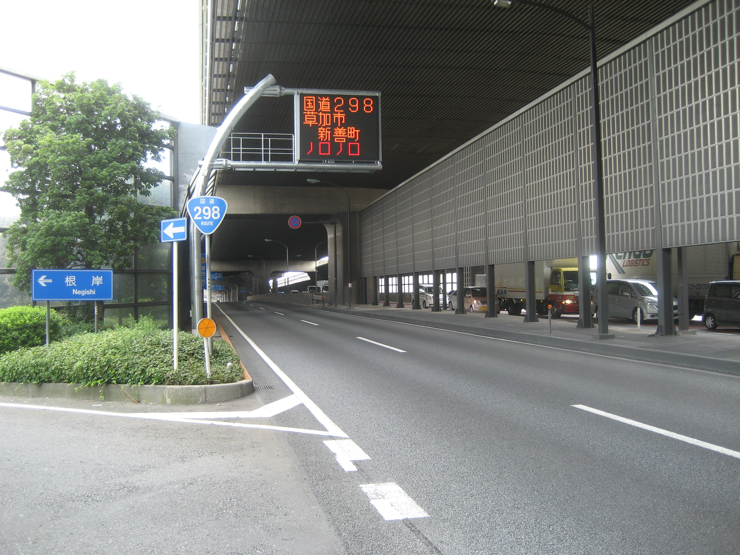 国道298号線外回り埼玉県川口市安行領根岸付近